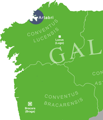 Mapa que amosa situación aproximada da tribo dos ártabros ou Artabri, na provincia romana da Gallaecia.